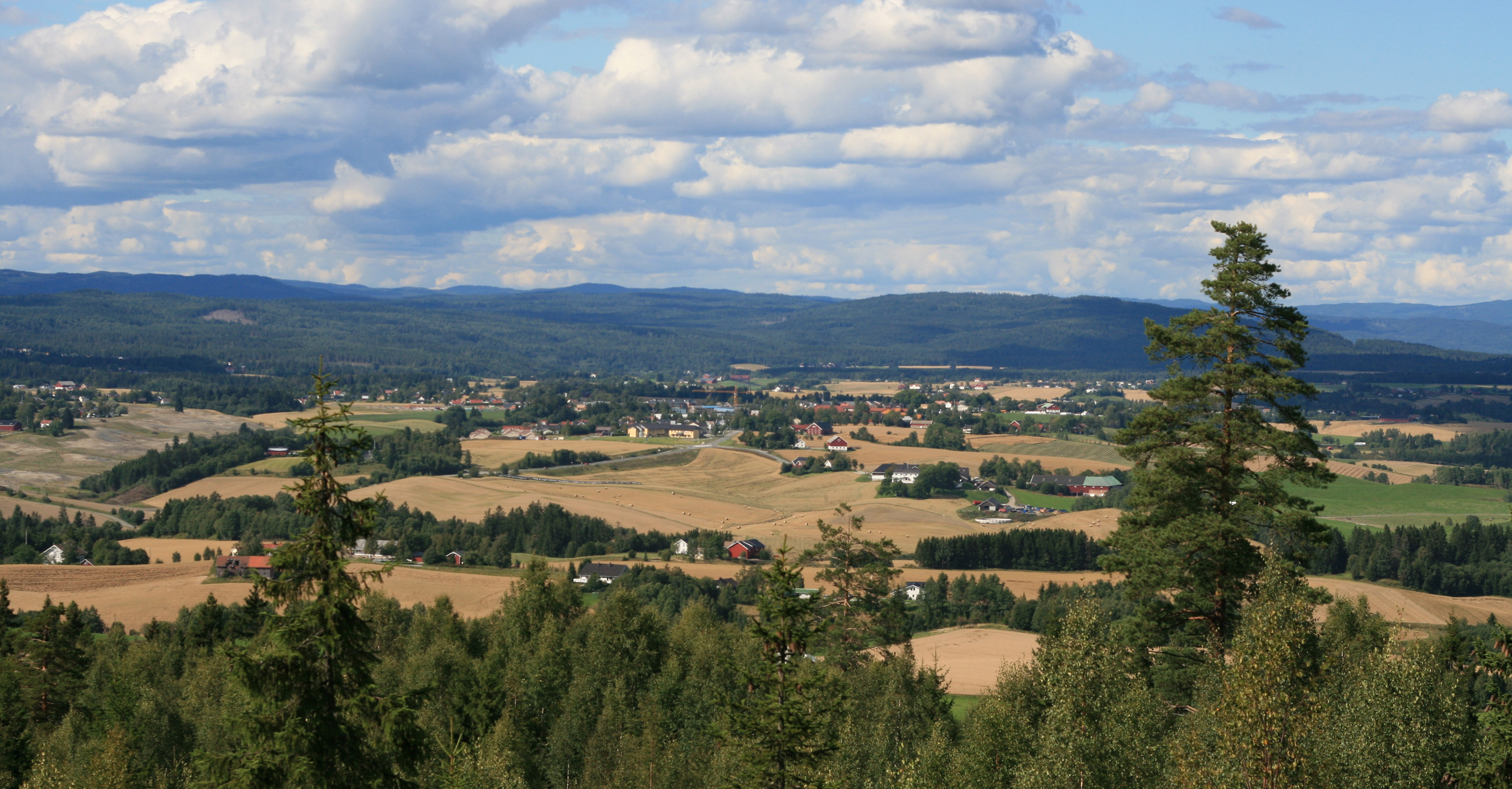 Gjerdrum, Romerike, Akershus, sett fra Heksebergfjellet. Kommunesenteret Ask i mellomgrunnen, Romeriksåsene i bakgrunnen.